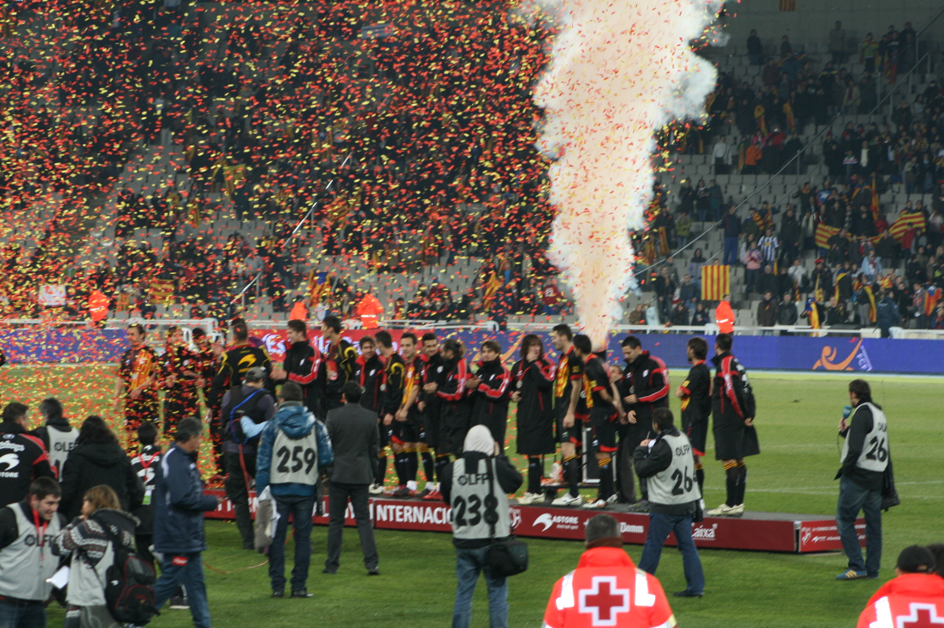 Trofeu Catalunya Internacional 2010.